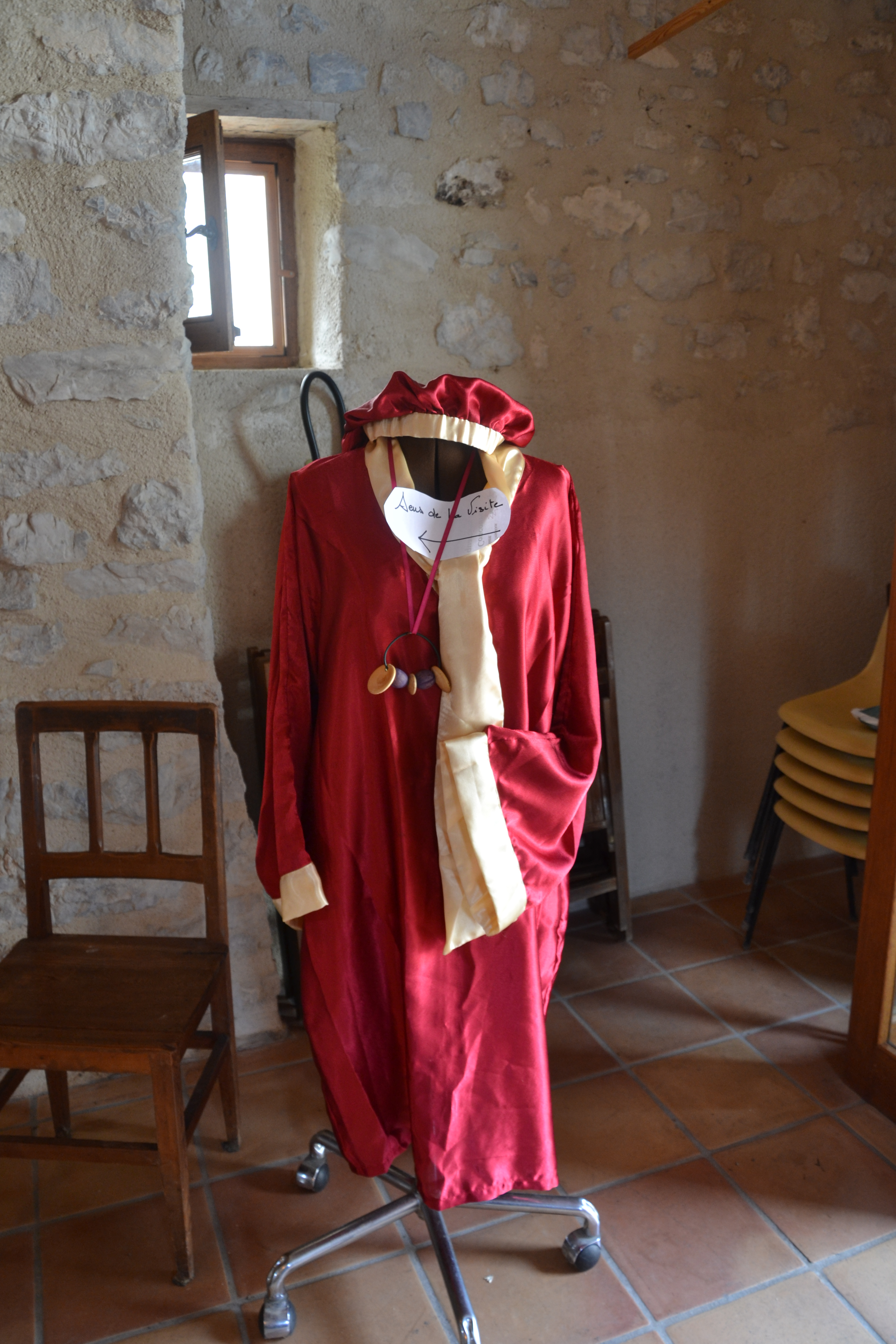 expo à Trescléoux